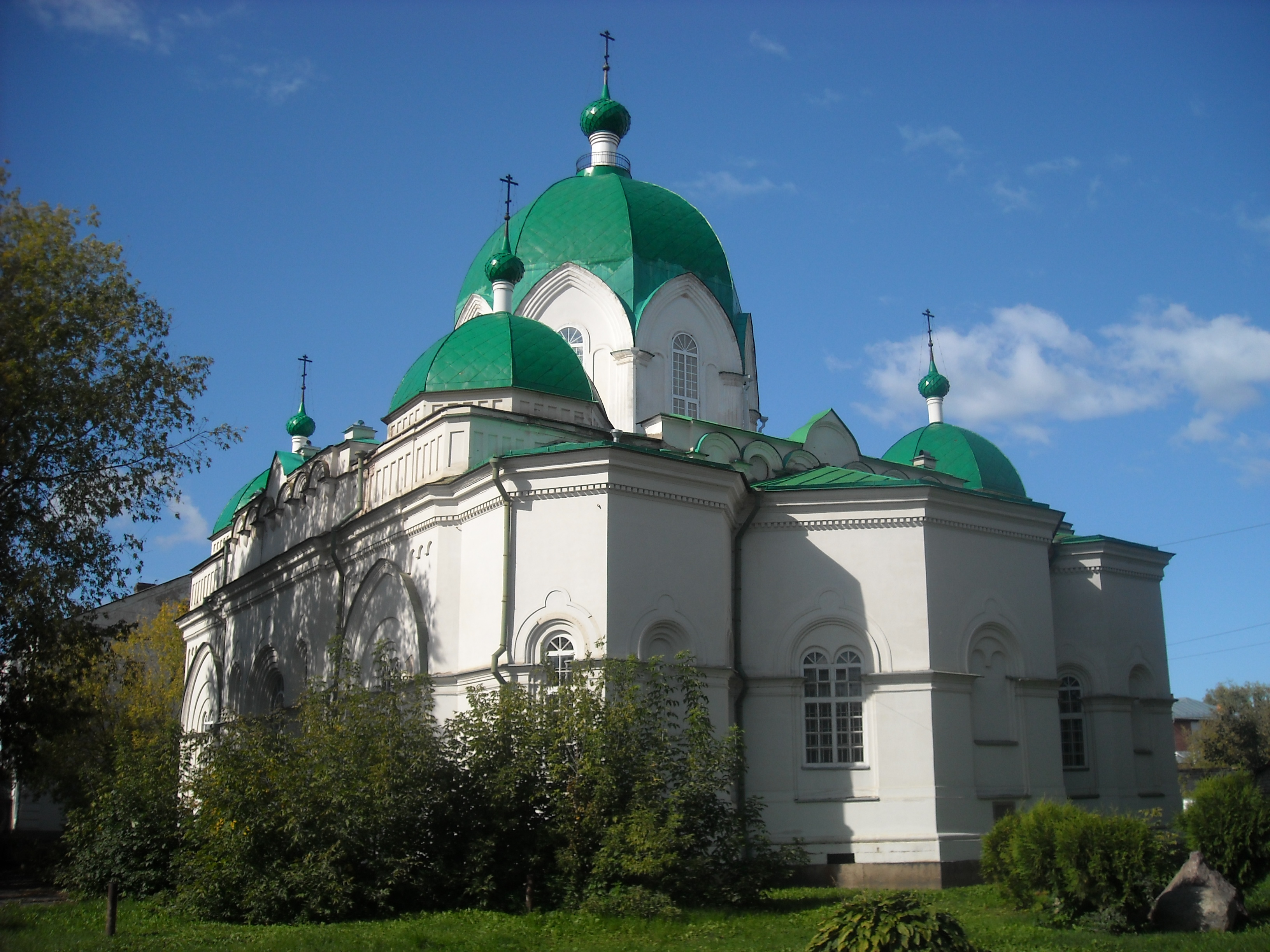 Церковь Сретения Крестовоздвиженского прихода: улица Крестовая, 104, Рыбинск, Ярославская область